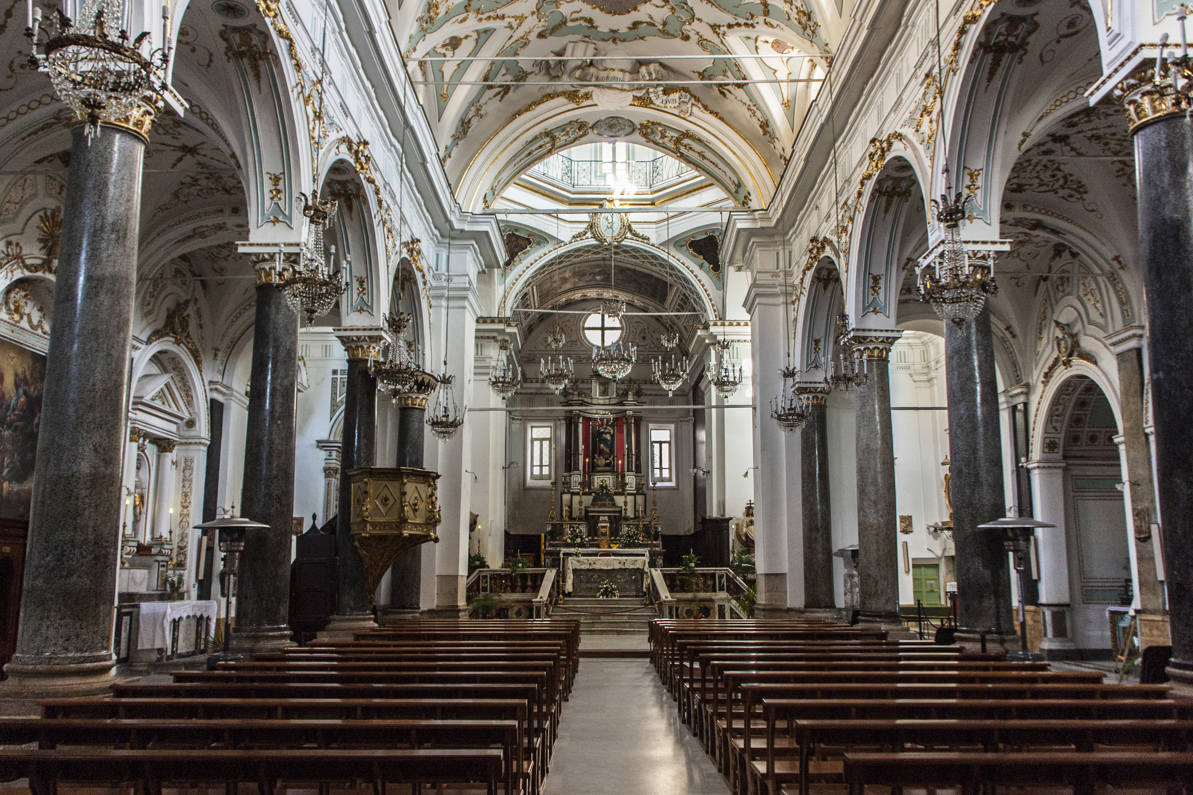 Matrice di Gangi